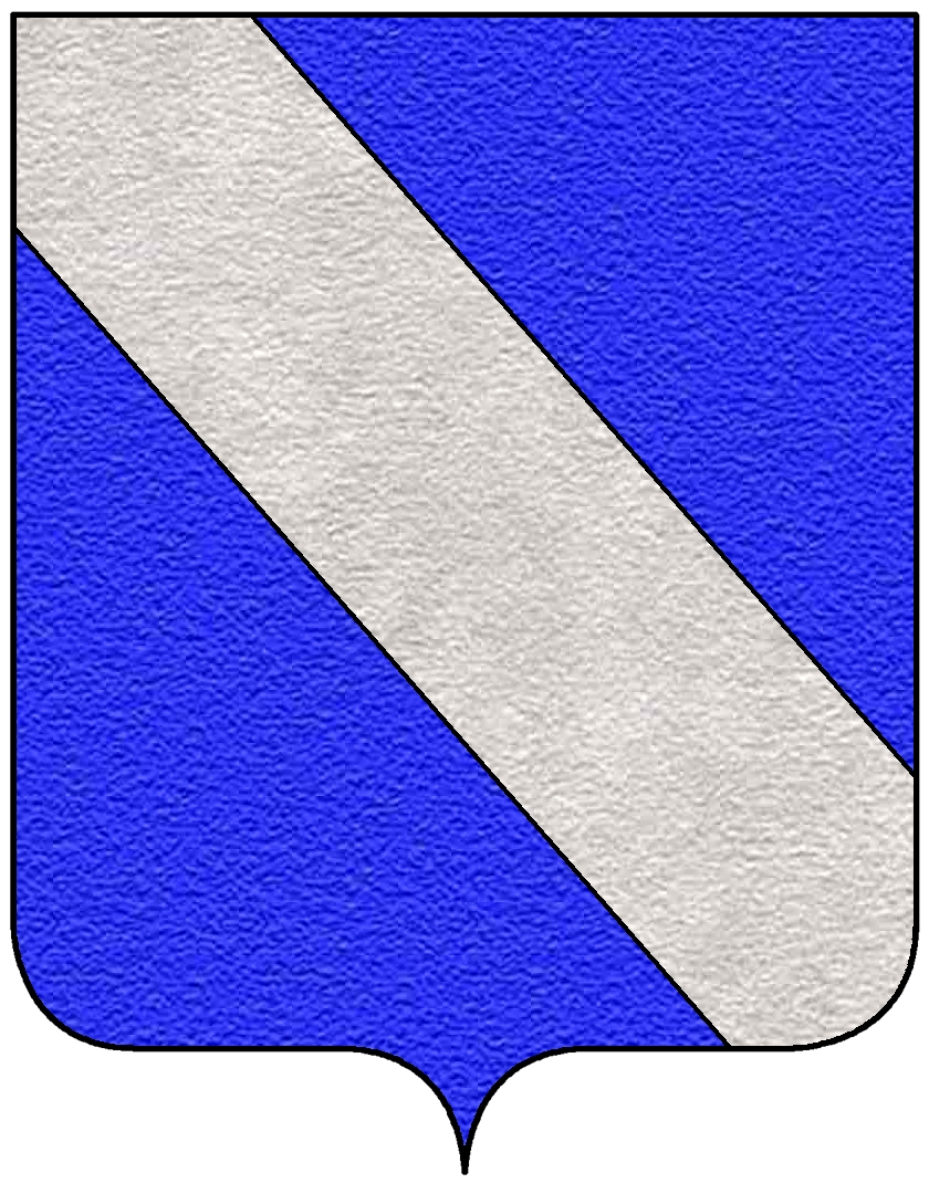 Stemma della famiglia Condulmari o Condulmer, appartenente al patriziato di Venezia.